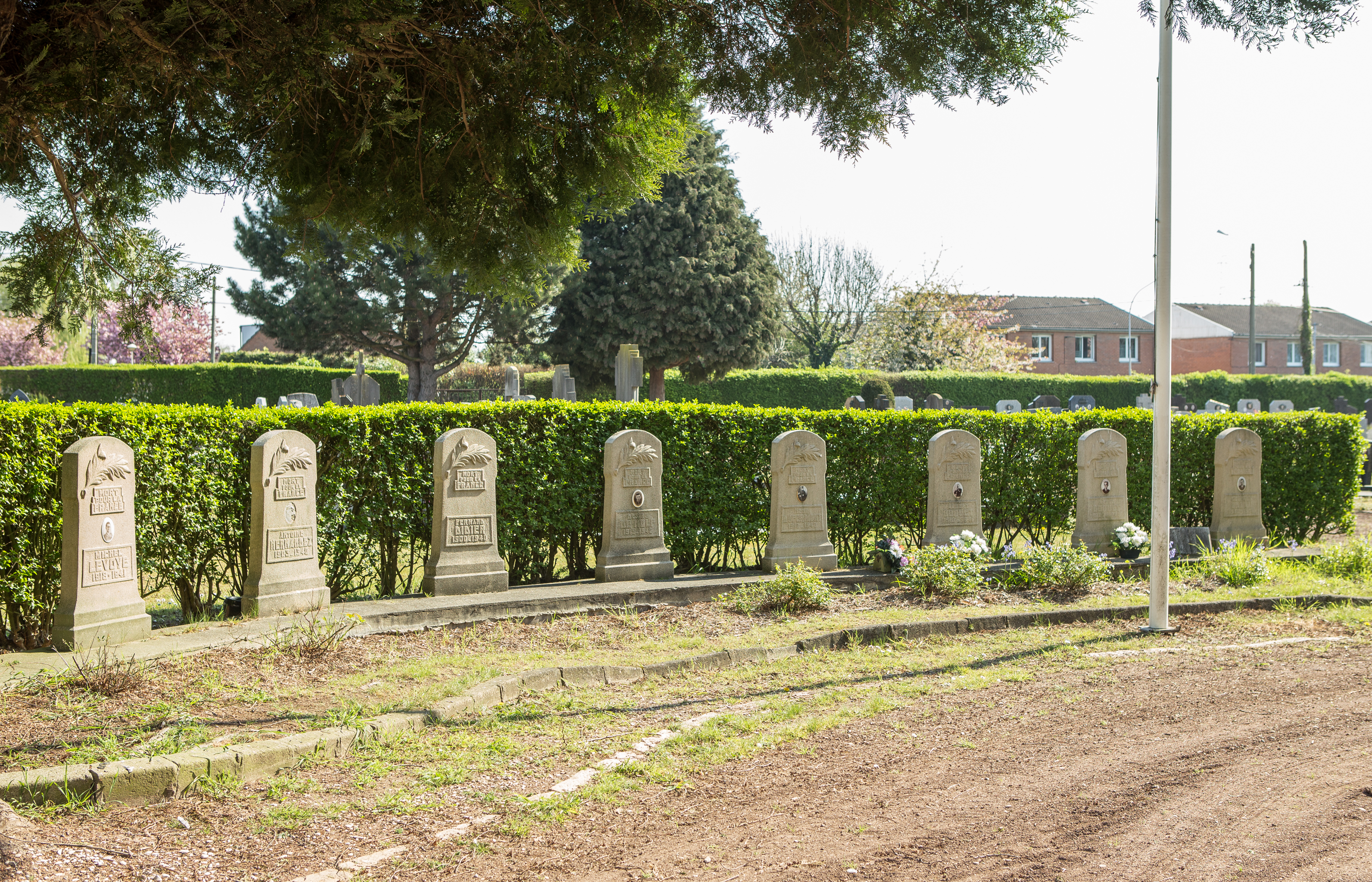 Cretinier Communal Cemetery